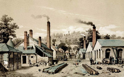 Lithografie der Zinkwerke der Vieille Montagne in Bray